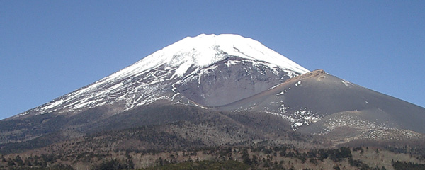 富士山宝永山 裾野市水ヶ塚公園 2003年12月撮影 Category:富士山